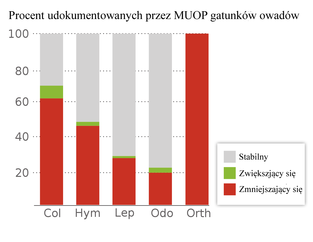 Odsetek gatunków owadów o udokumentowanym przez International Union for Conservation of Nature trendzie liczebności populacji w 5 rzędach. Col: Coleoptera (chrząszcze), Hym: Hymenoptera (błonkoskrzydłe), Lep: Lepidoptera (motyle), Odo: Odonata (ważki), Orth: Orthoptera (prostoskrzydłe)) według stanu na 2014 rok. Dane z Rodolfo Dirzo, Hillary S. Young, Mauro Galetti , Gerardo Ceballos. Defaunation in the Anthropocene Article· Literature Review. „Science”. 345 (6195), s. 401-406, 2014.